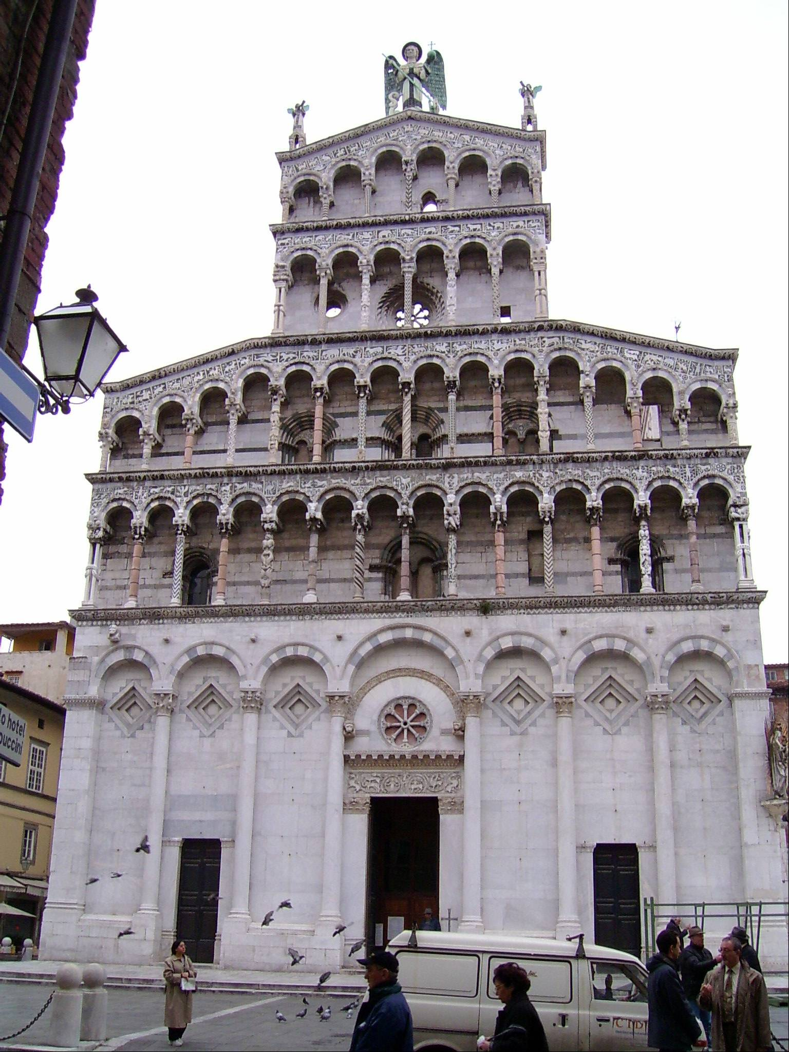 Chiesa di San Michele in Foro, Lucca (Toscana, Italia)